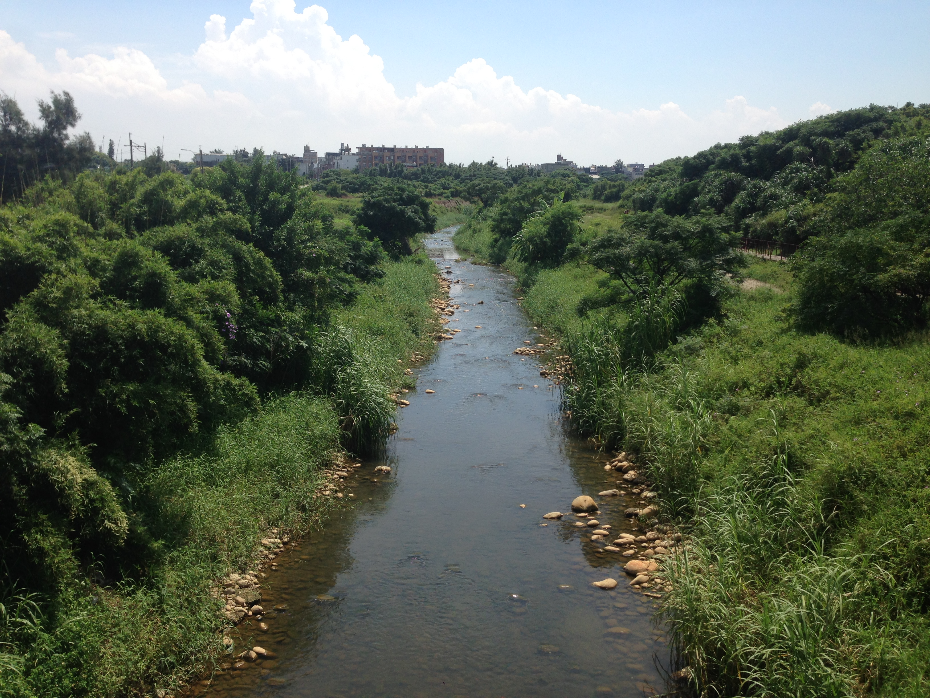 中文（台灣）: 白沙岬燈塔附近觀音溪